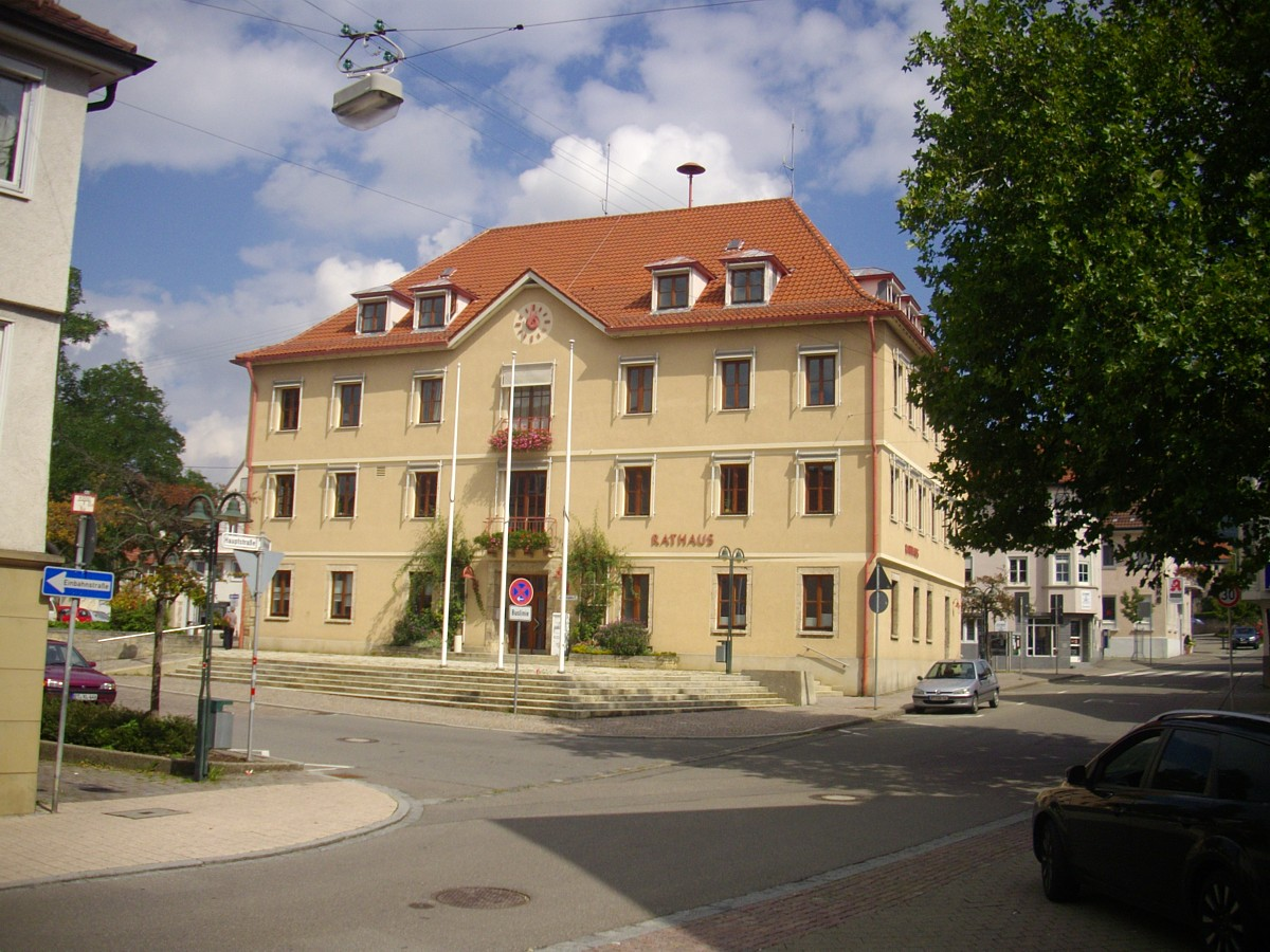 Eningen unter Achalm, Landkreis Reutlingen, Rathaus